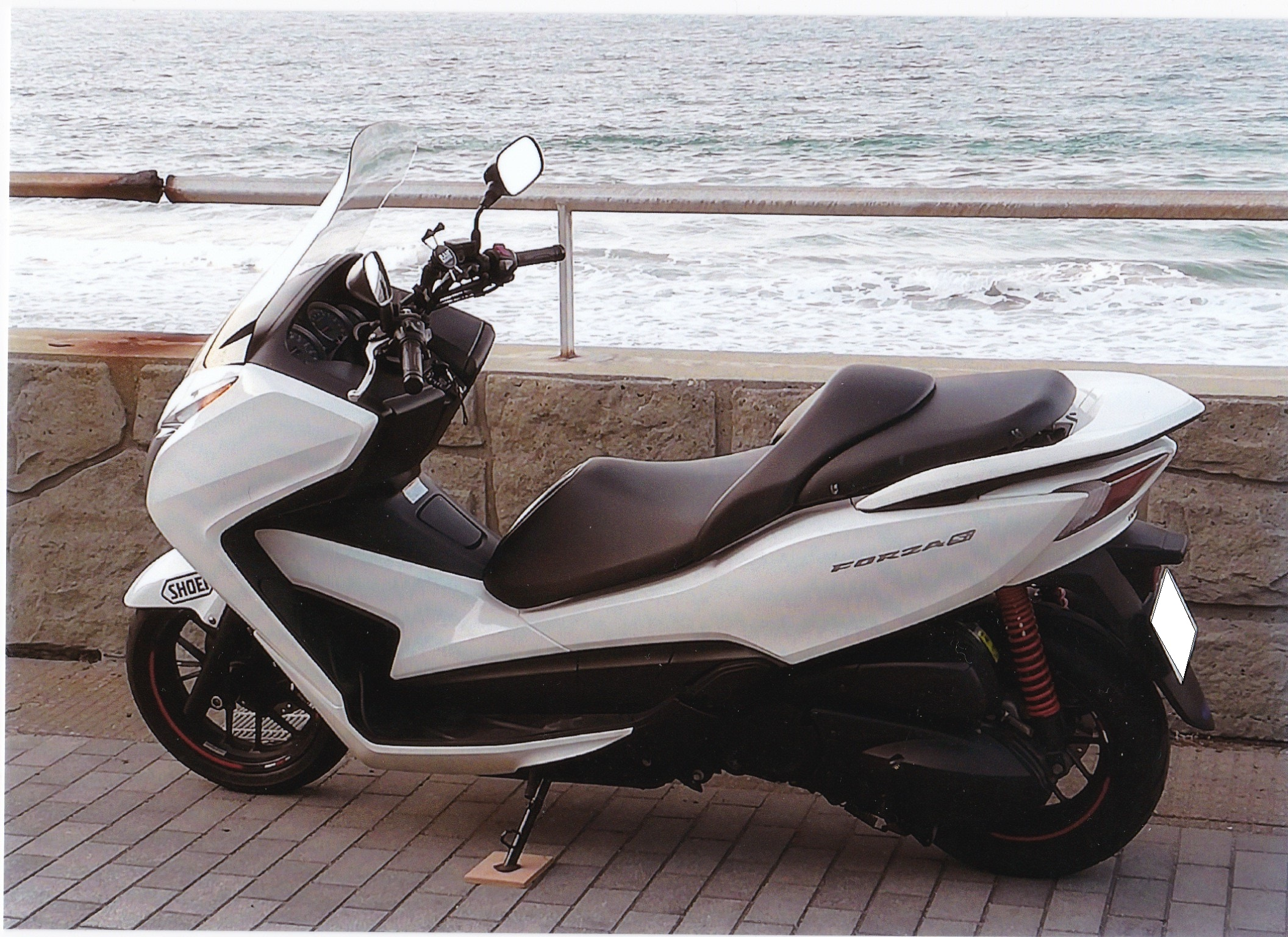 フォルツァsi